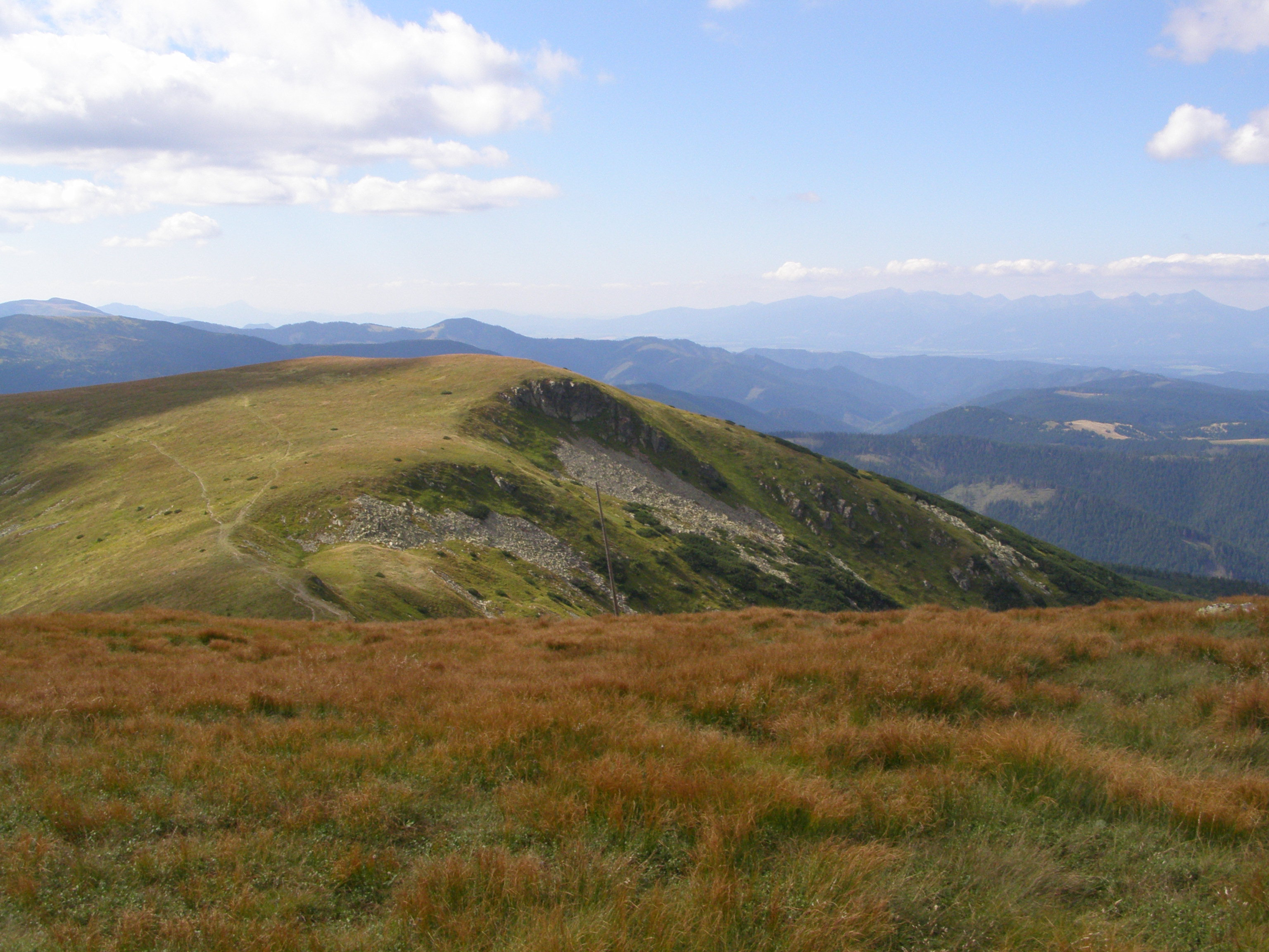 Nízké Tatry, Kráľovohoľské Tatry, pohled z vrcholu Orlová (1840 m) na severozápad: v popředí vrchol Bartková (1790 m), vpravo na obzoru Vysoké Tatry